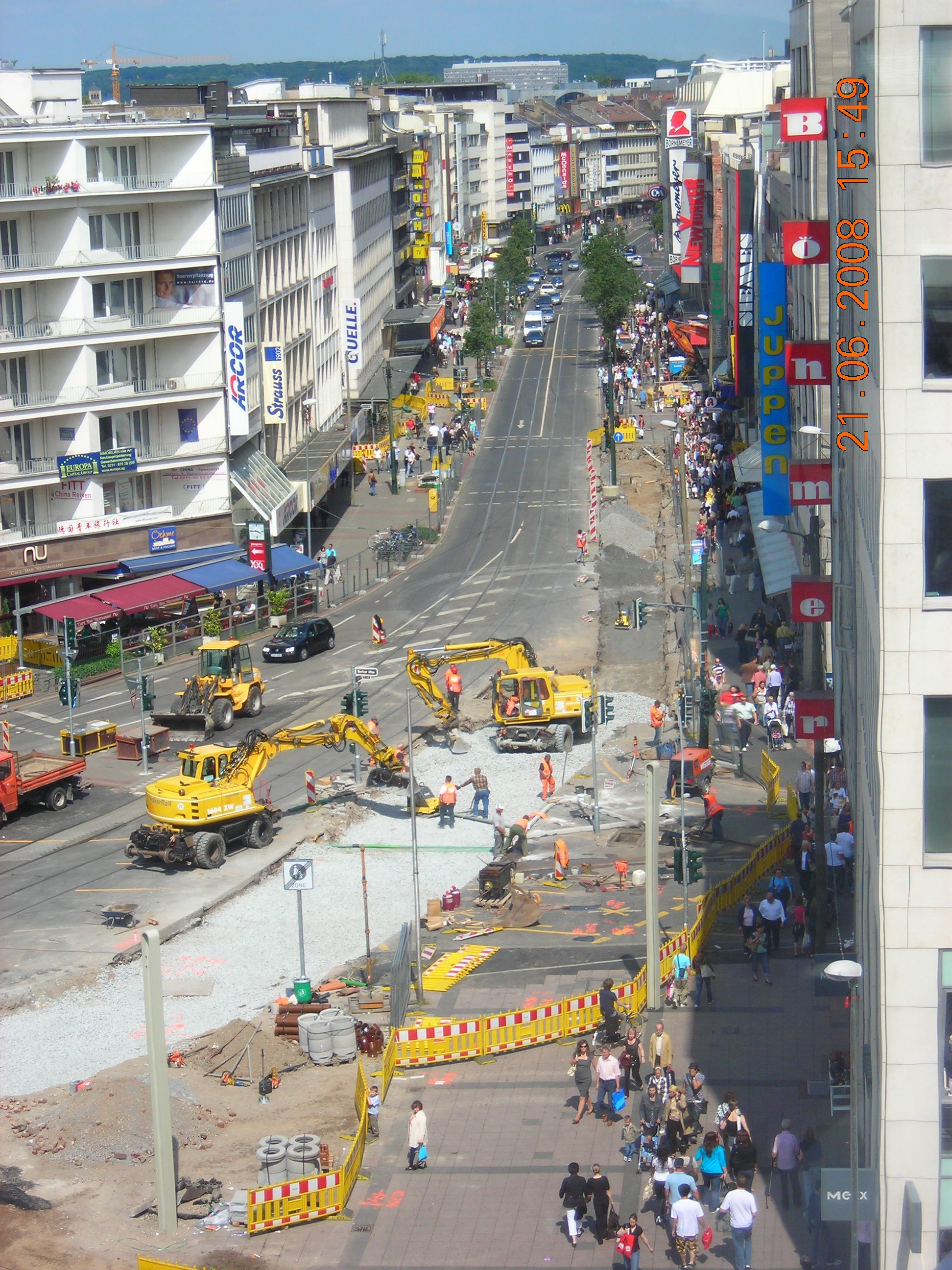 Baustellen auf der Schadowstraße